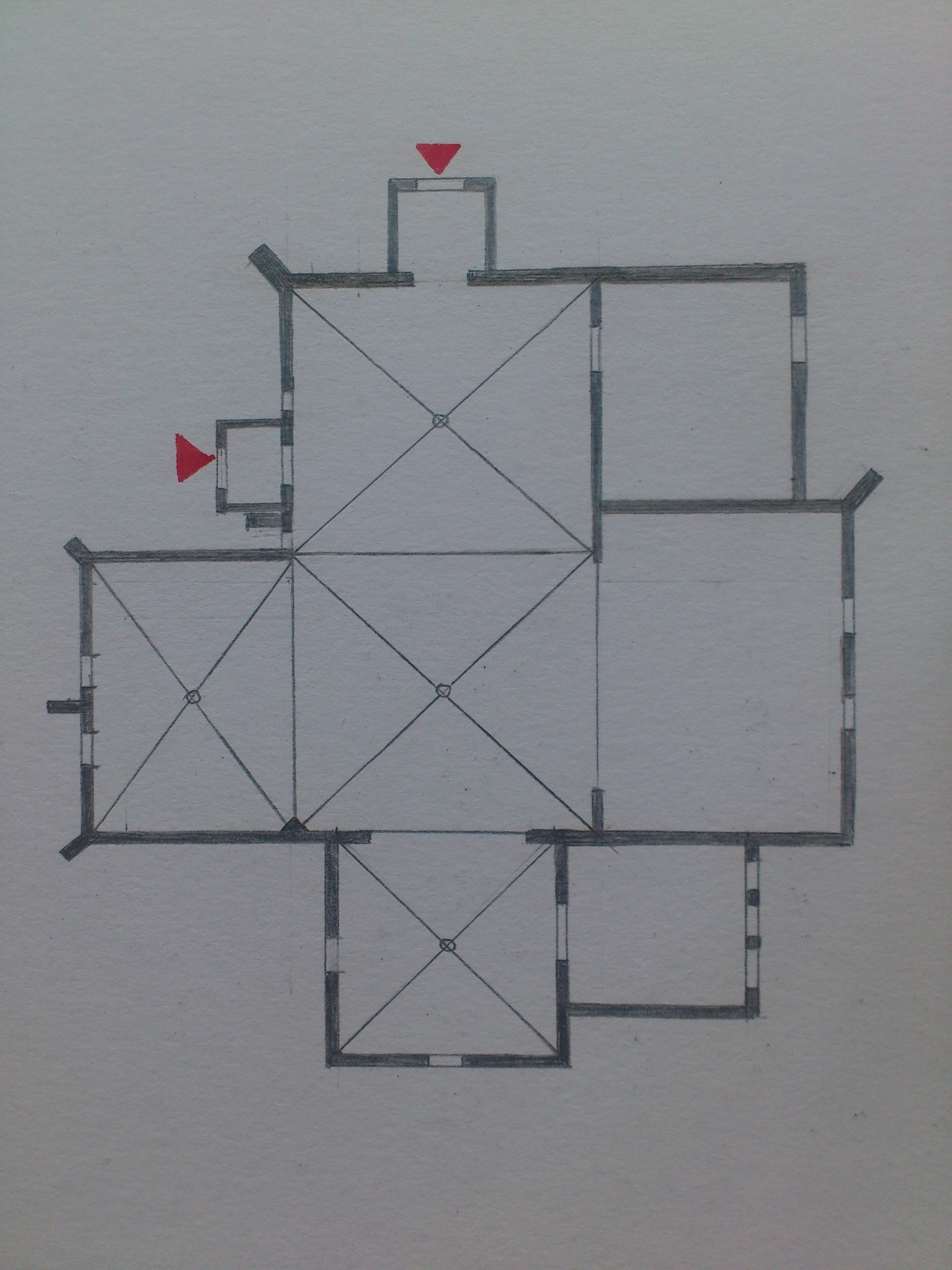 Půdorys